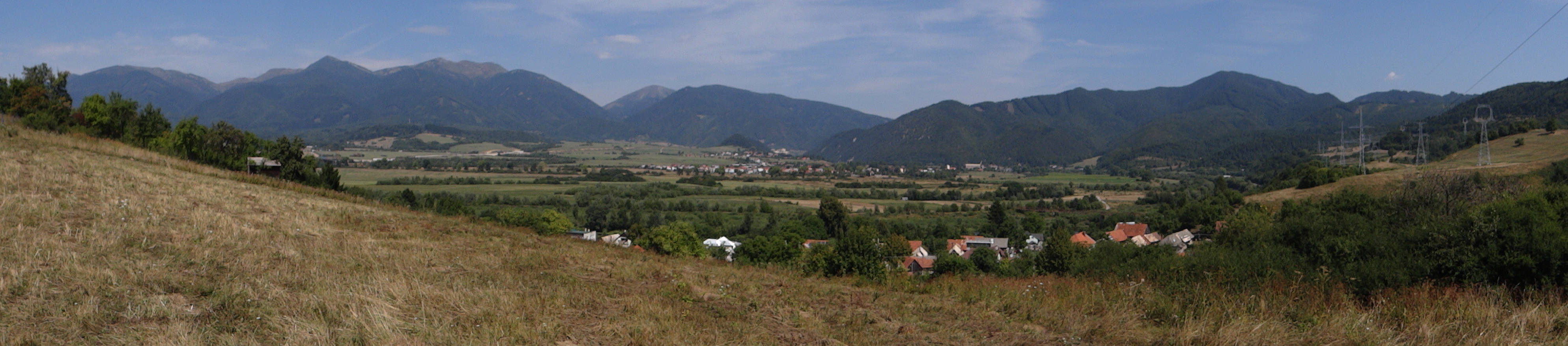 Turčianska kotlina. Kotlina Turczańska przy miejscowości Nolčovo. W głębi Mała Fatra Krywańska, po prawej stronie Wielka Fatra